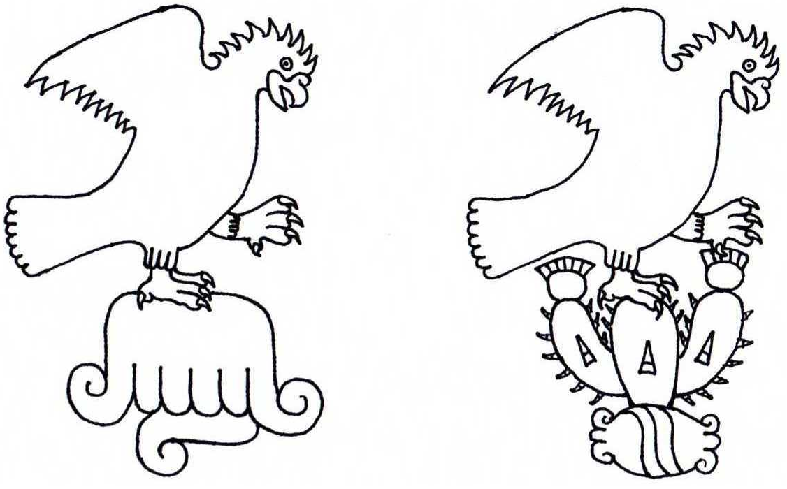 Rediseñado en base a la lámina I del Códice Mendoza, donde aparece el toponímico de Tenochtitlan, éste me sirvió para crear el de Cuauhmixtitlan, inexistente en los códices.